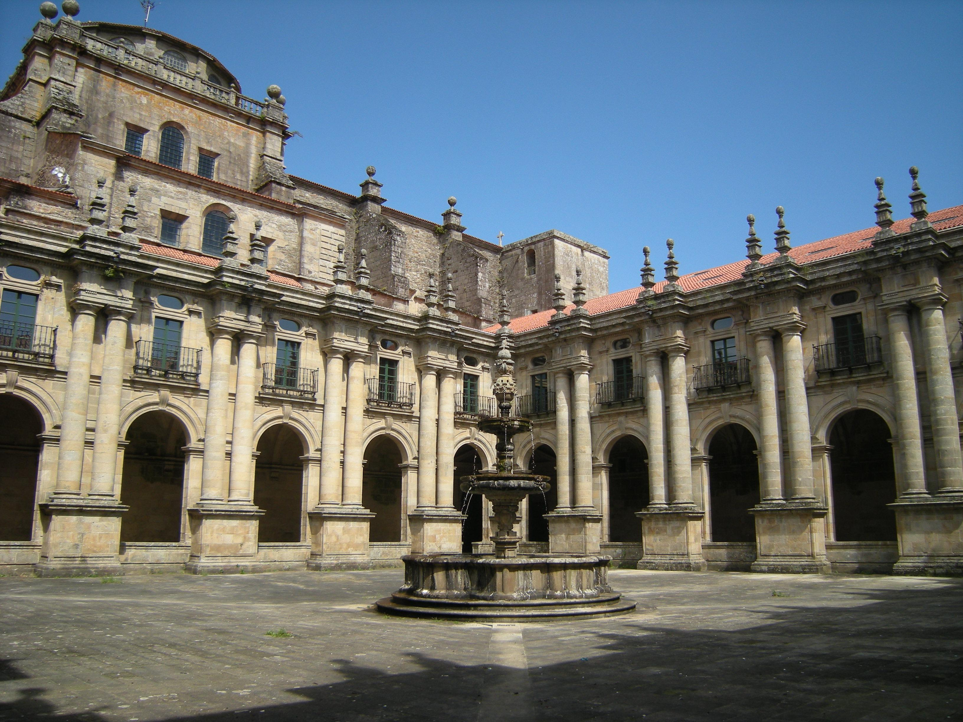 Claustro procesional. Esta foto participó en el juego En un lugar de Flickr.